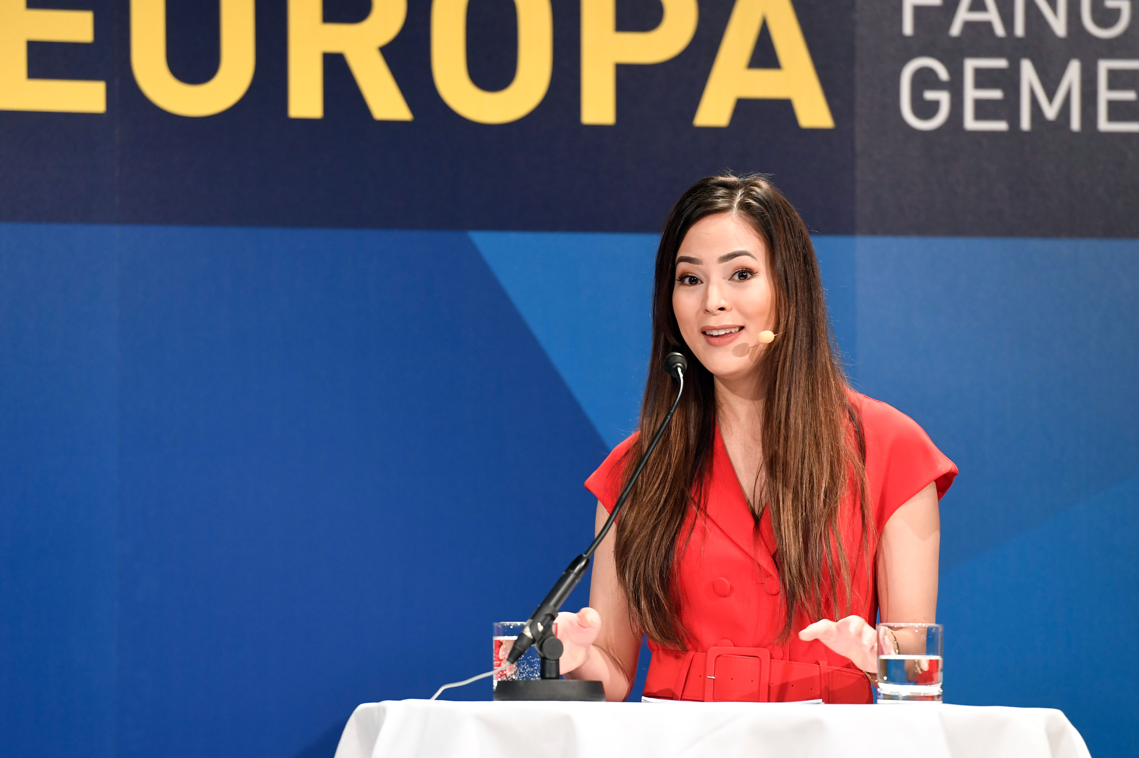 Wien am 16. November 2018, Auf Einladung von Außenministerin Karin Kneissl fand heute die 5. Generalversammlung der Europa-Gemeinderäte und Gemeinderätinnen in Wien statt. #EUGemeinderäte Am Programm standen zahlreiche Vorträge, sowie eine Podiumsdiskussion mit hochrangigen Experten und Workshops, um die EU-Gemeinderäte mit nützlichem EU-Wissen für ihre Tätigkeit auf kommunaler Ebene auszustatten. Im Rahmen der Veranstaltung wurde auch eine Absichtserklärung unterzeichnet, die die partnerschaftliche Fortführung des österreichischen Erfolgskonzeptes „Europa fängt in der Gemeinde an“ besiegelt. Foto: Mahmoud